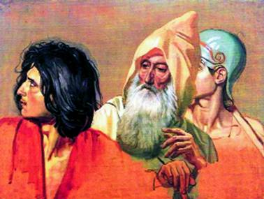 Александр Иванов. Этюды к картине «Явление Мессии».